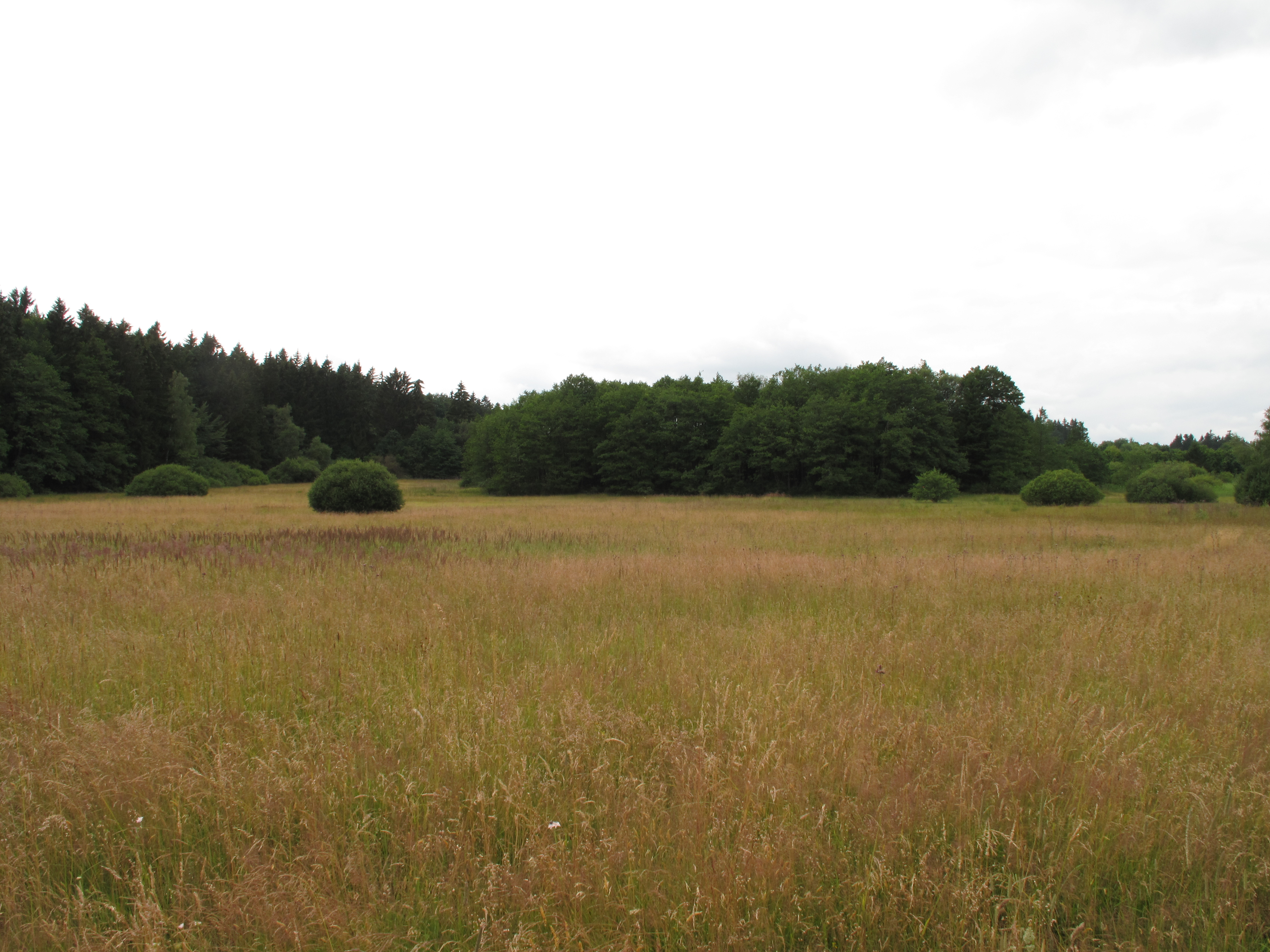 Přírodní rezervace Čermákovy louky. Okres Pelhřimov, Česká republika.